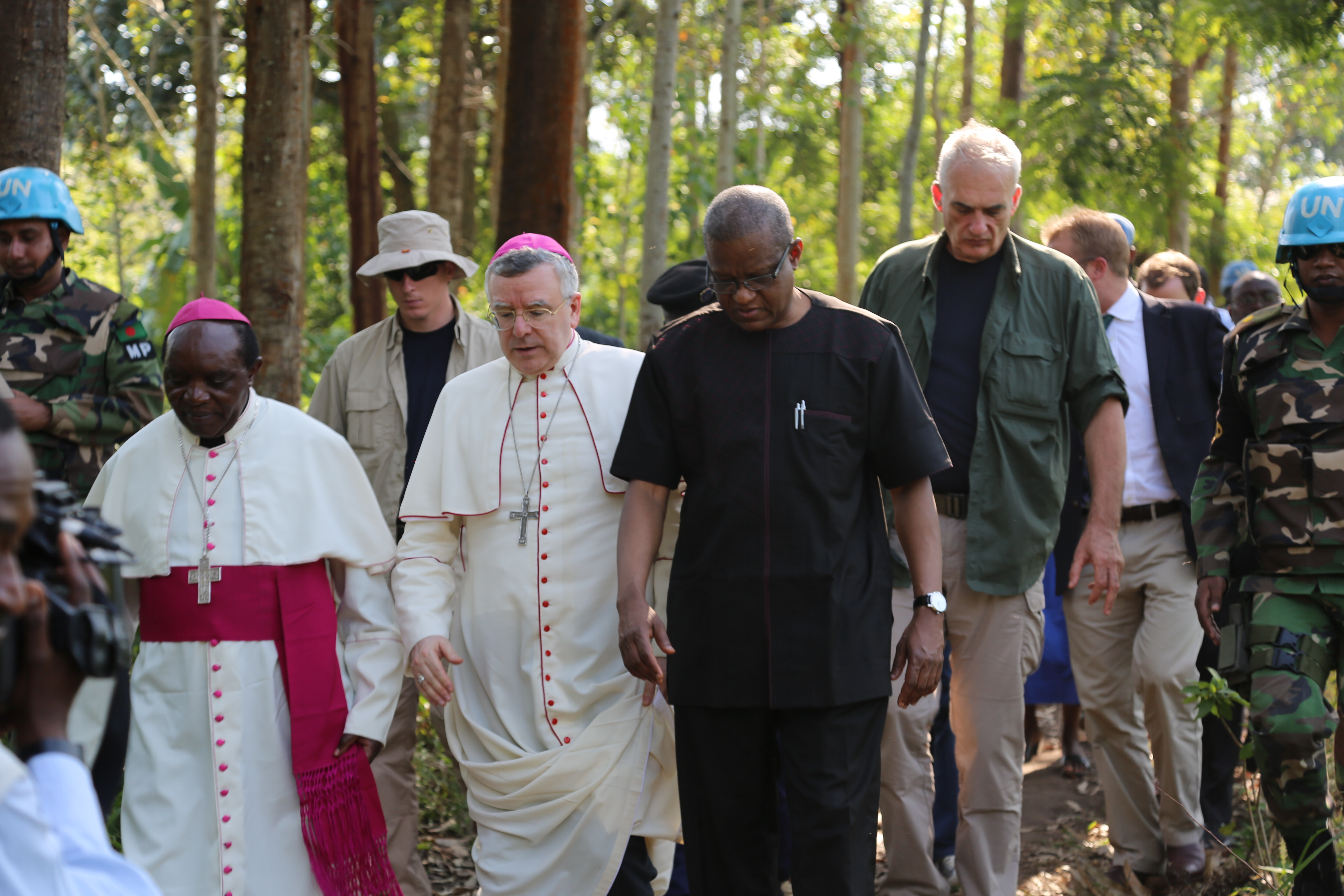 Mgr Melchisedec Sikuli Paluku, Mgr Luis Mariano Montemayor et Maman Sidikou le 29 août 2016 à Béni, sur les lieux d'un massacre commis le 15 août par les ADF